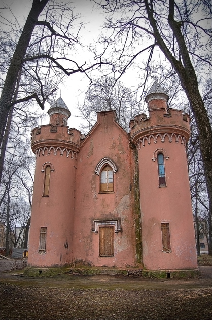 Беларуская (тарашкевіца): Ансамбль былой сядзібы: жылы дом скарбніца флігель паўночная ўязная брама гаспадарчыя пабудовы рэшткі Сьвята-Мікалаеўскай царквы валун воданапорная вежа парк альтанка. в. Станькава This is a photo of Belarusian heritage monument. Reference number: 613Г000144 ( WLM)